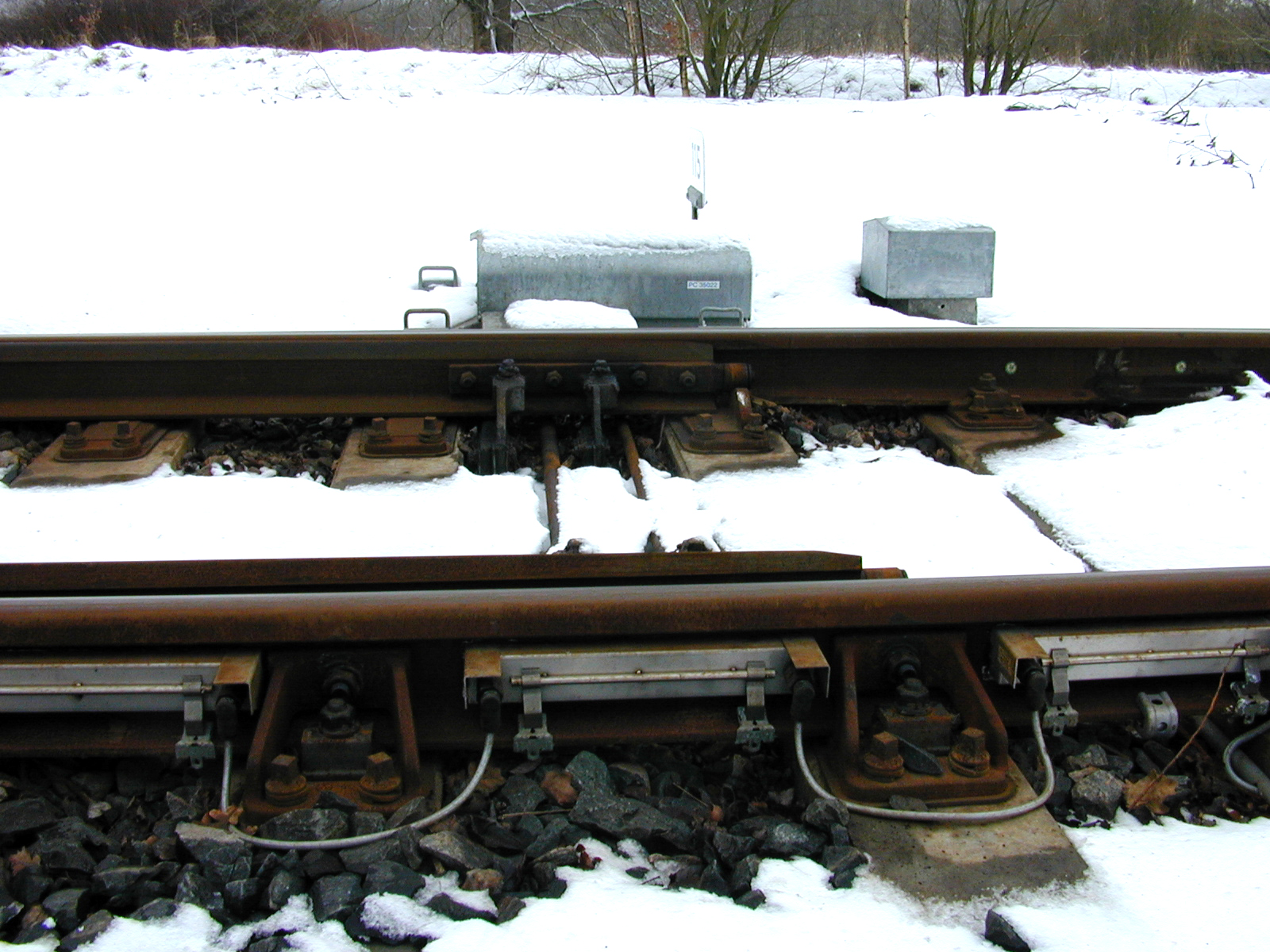 Elektrische wisselverwarming in Nederland. Dit systeem wordt sinds 2005 niet meer toegepast.